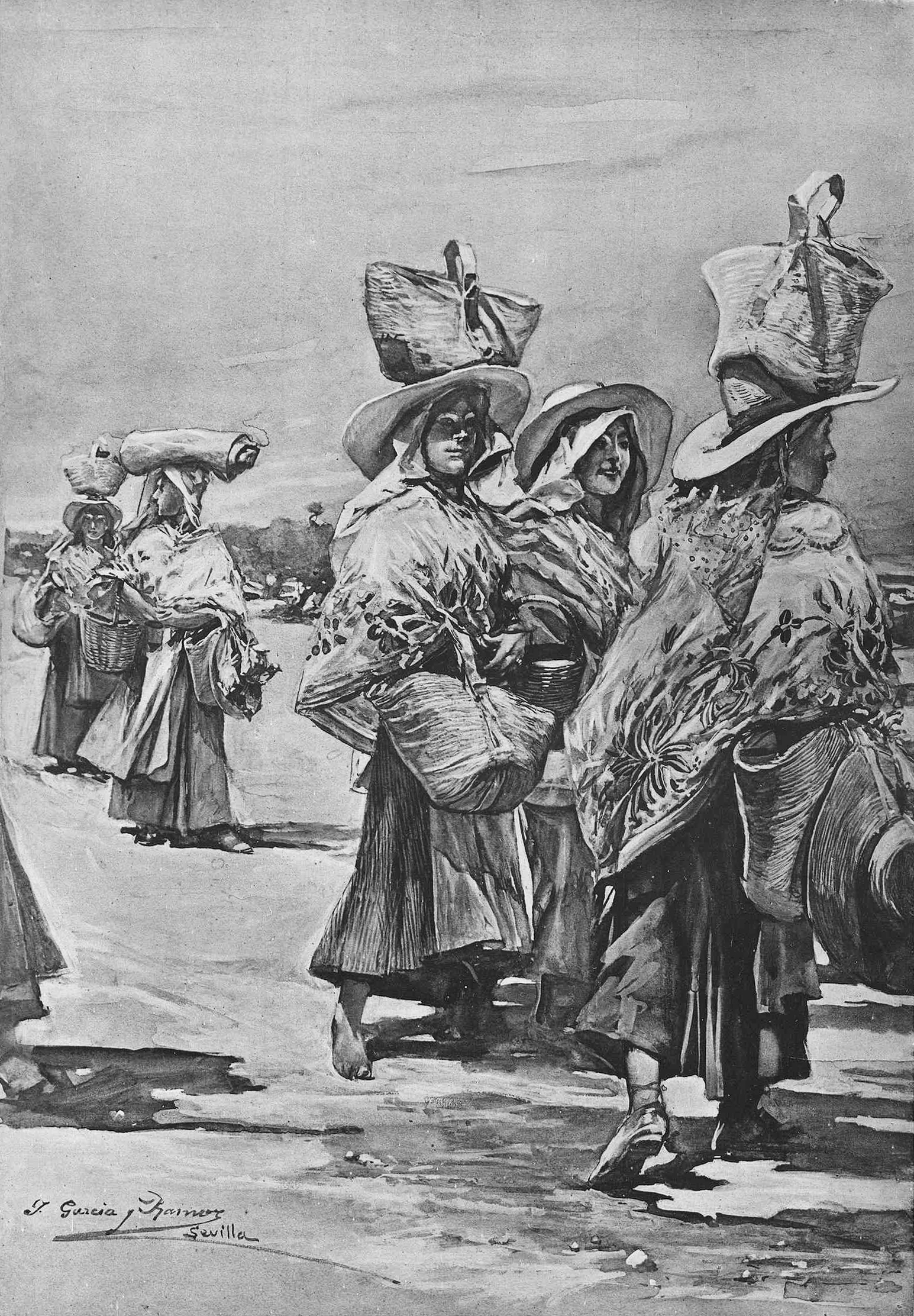 Algabeñas camino de Sevilla. Dibujo original de J. García Ramos.